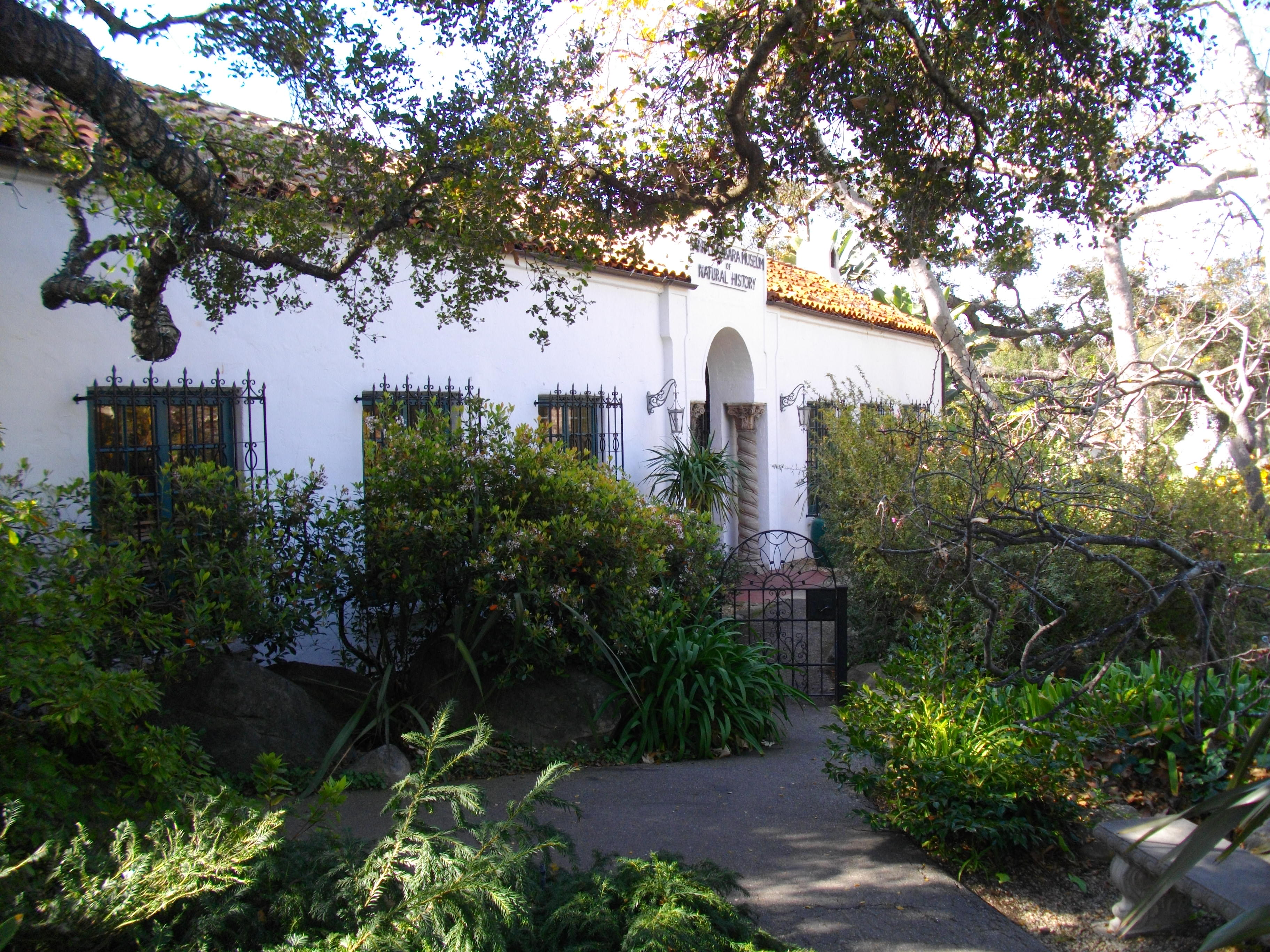 Entrée du Muséum d'Histoire naturelle de Santa Barbara